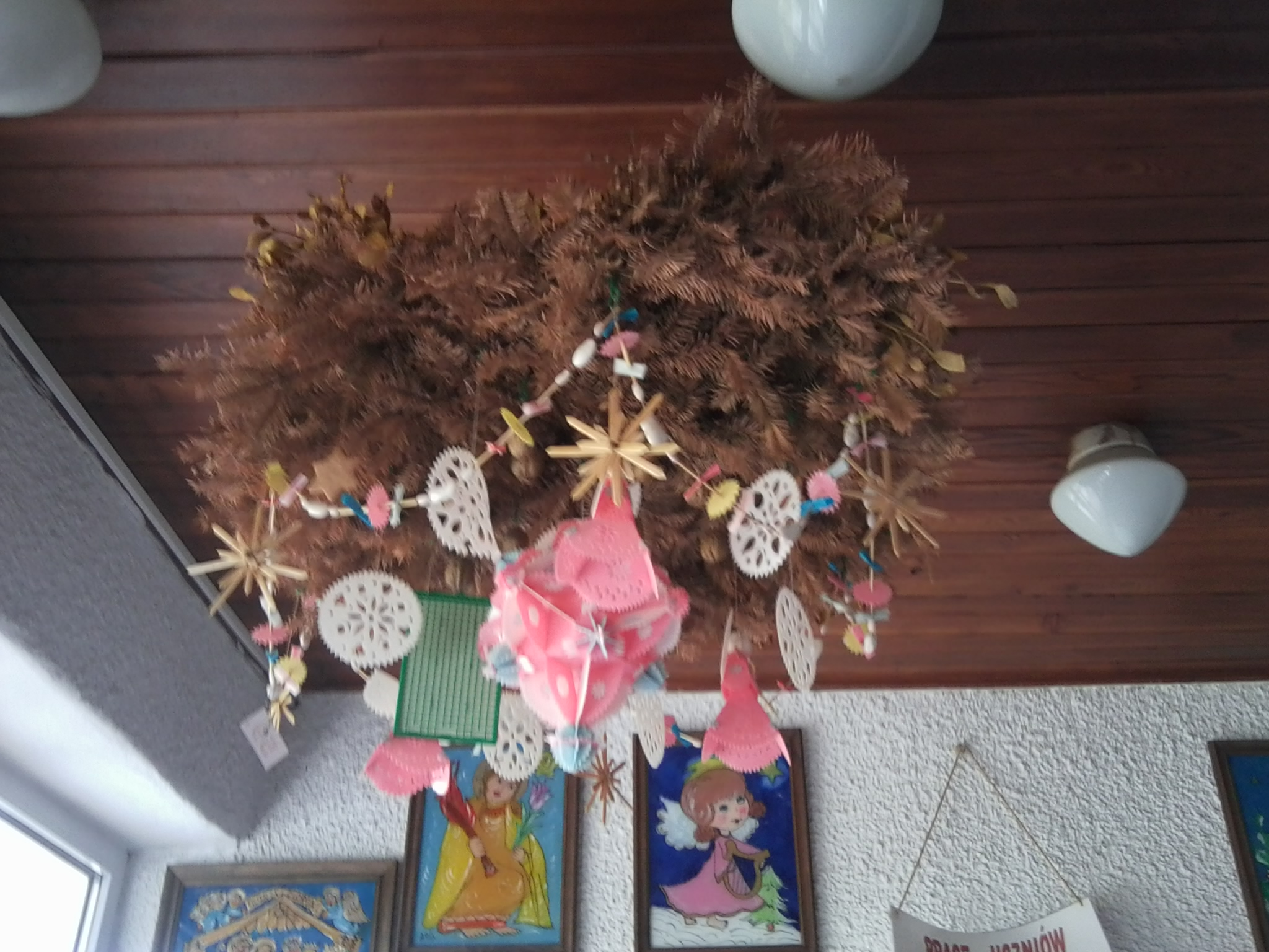 Tradycyjna podłaźniczka lachowska w Gminnym Ośrodku Kultury w Podegrodziu.